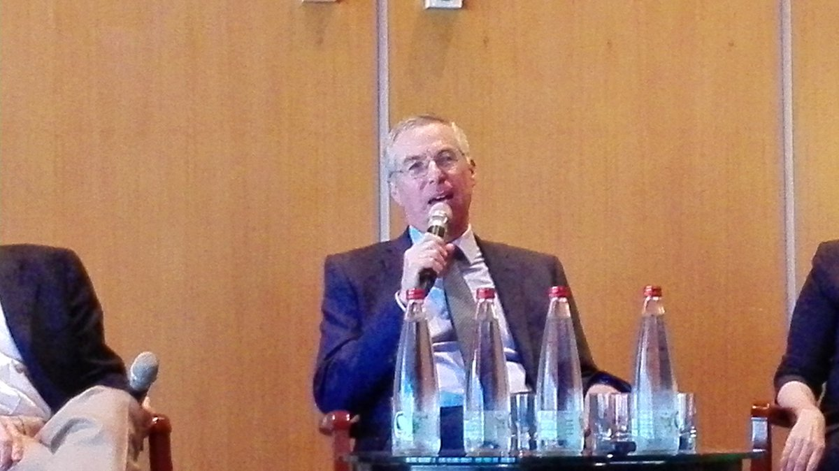 מיכאל הרצוג מדבר בפני חבר הנאמנים של הסוכנות היהודית